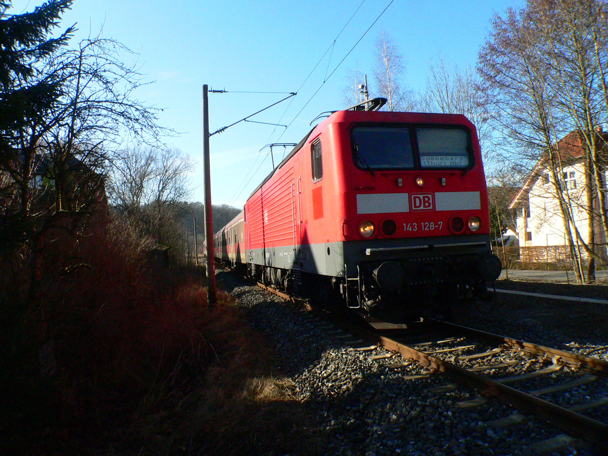 DB 143 128 auf der Strecke Coburg-Sonneberg